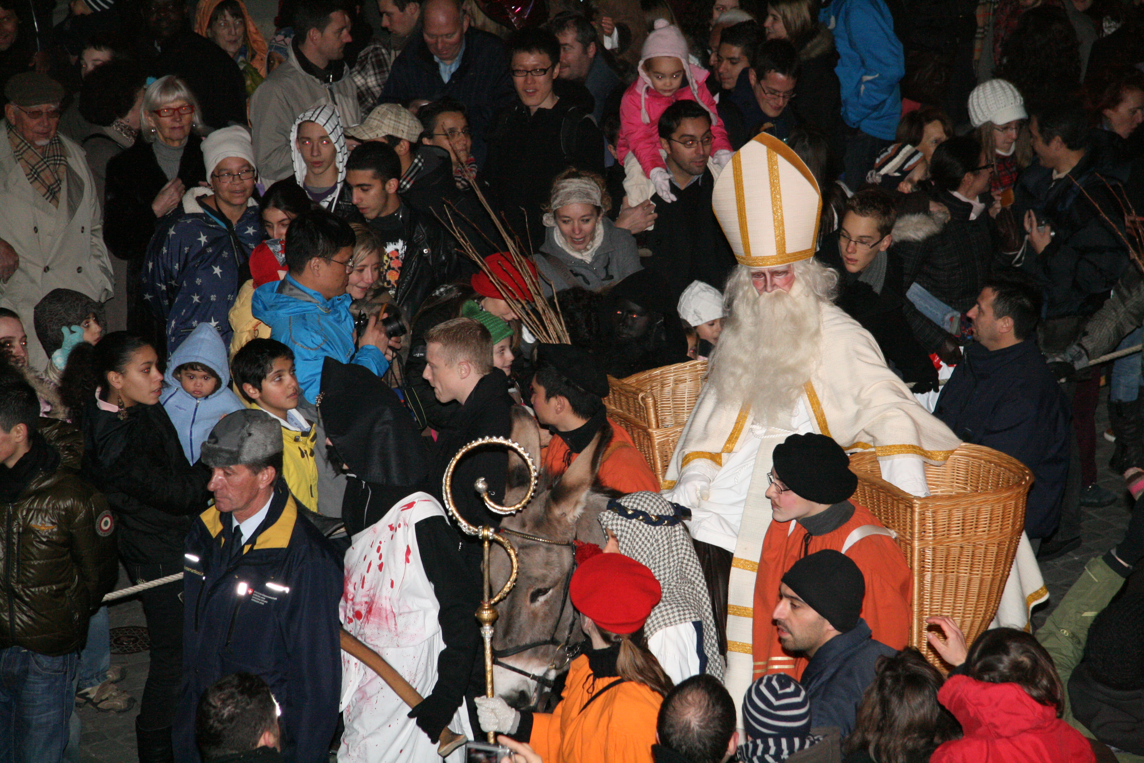 St-Nikolaus beim verteilen von Lebkuchen und Mandarinen beim traditionellen Umzug in Freiburg (CH)